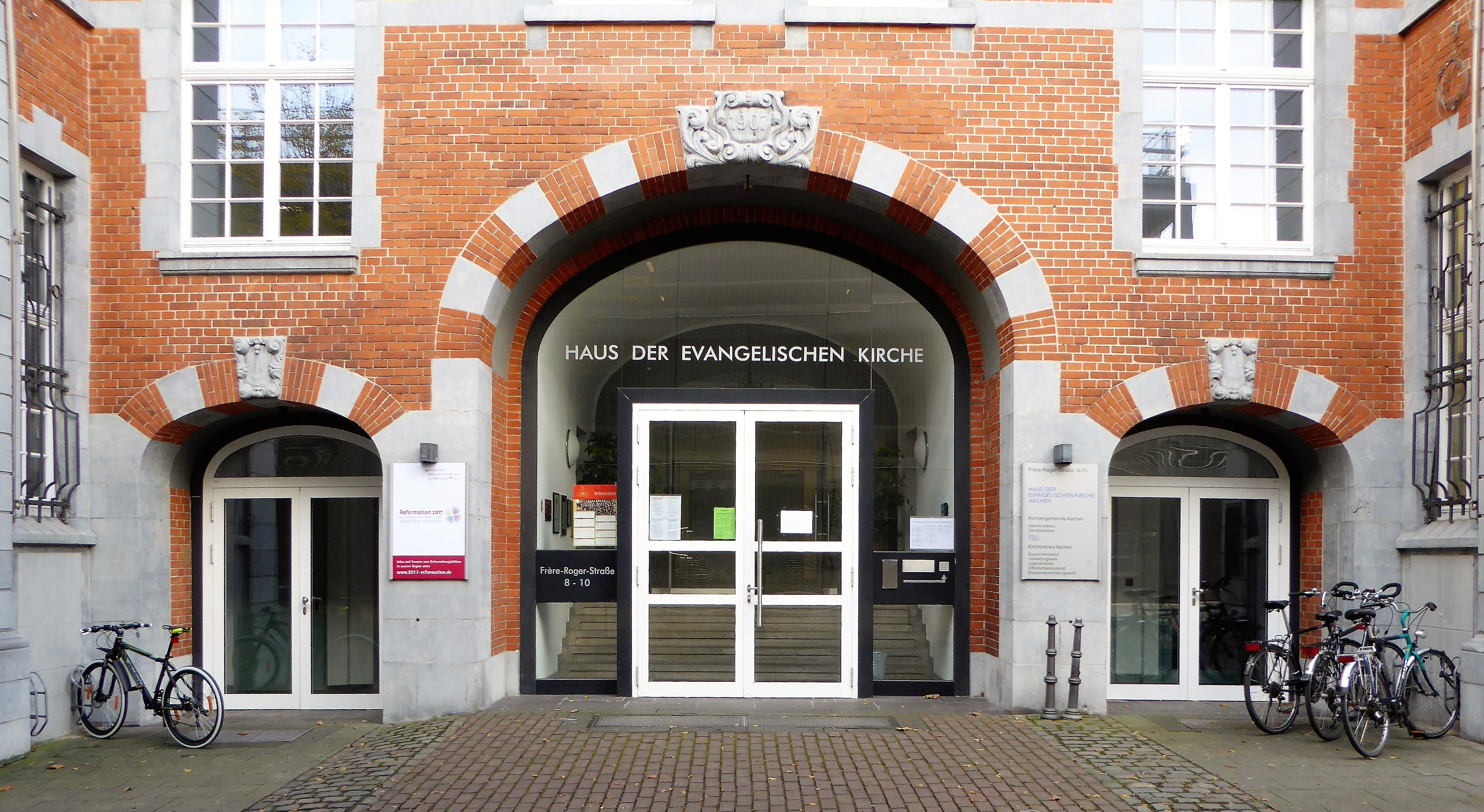 1986-2016: Dokumentation 30 Jahre Solarenergie-Förderverein Deutschland e. V. (SFV): Büro des SFV in der Frère-Roger-Straße 8 - 10 in 52062 Aachen (ab 01.01.2009)